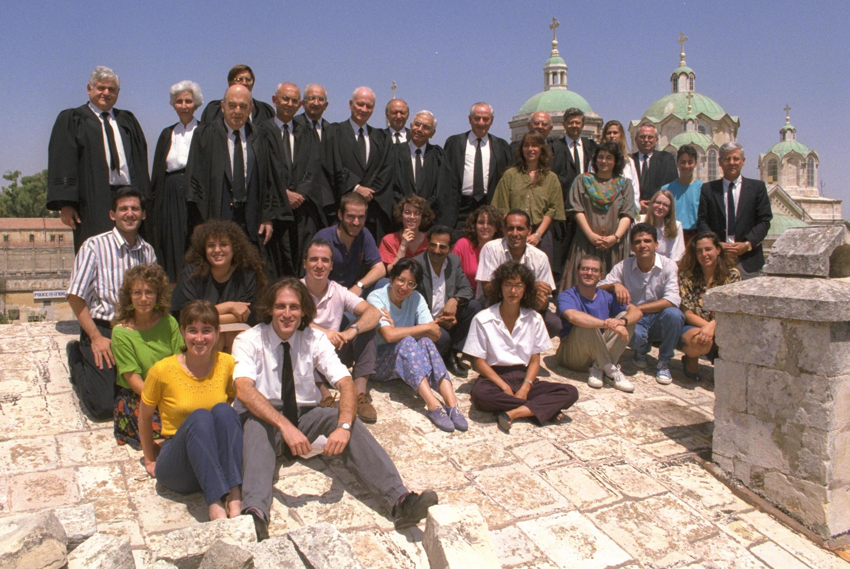 The Supreme Court Justices and their law clerks pose for a group picture on the roof of the old supreme court building at the Russian compound in Jerusalem. שופטי בית המשפט העליון ופקידי המשפט שלהם בתמונה קבוצתית על גג בית המשפט העליון הישן במגרש הרוסים בירושלים Photo: KOREN ZIV, 08/31/1992